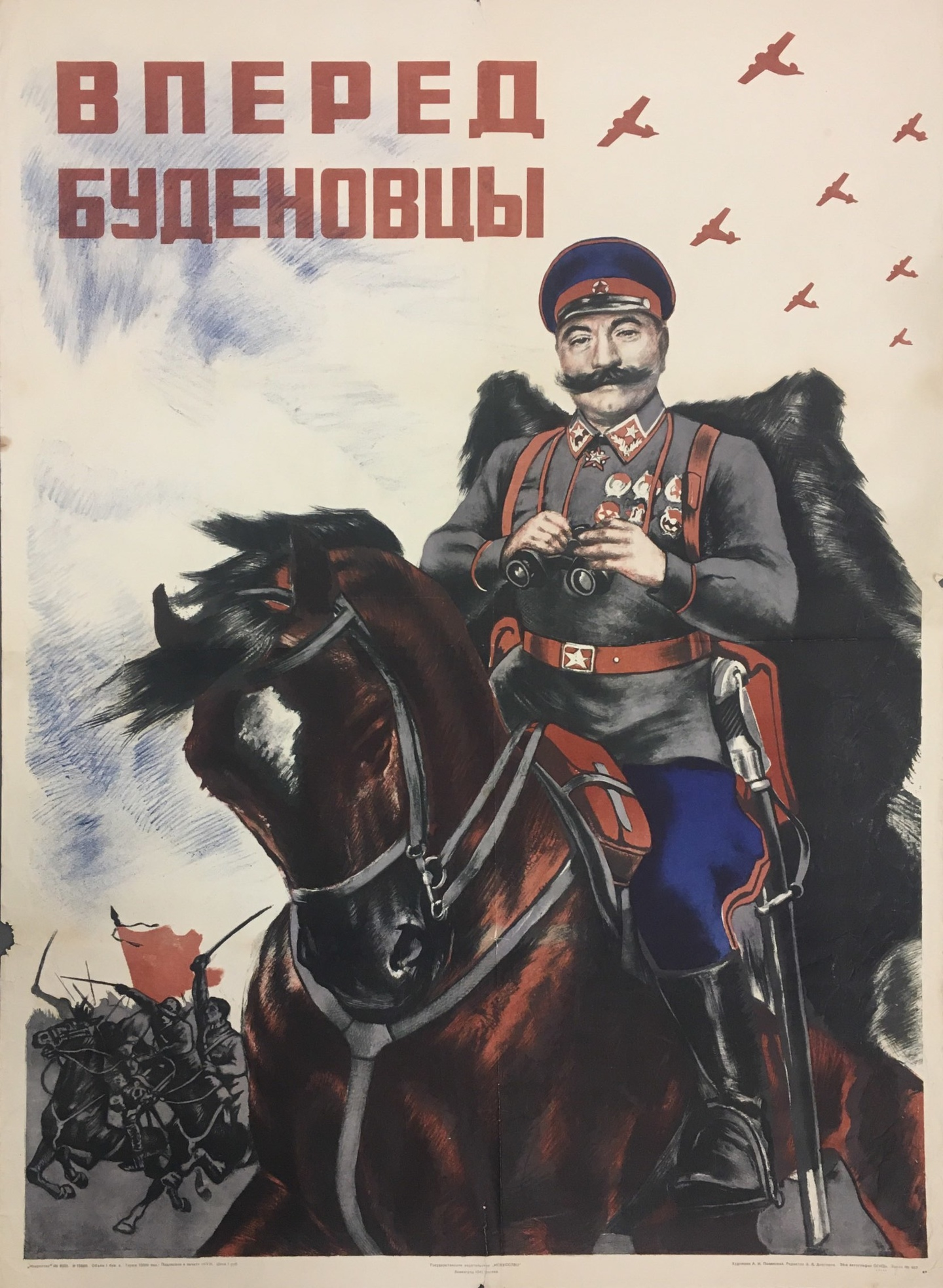 1941. Вперед Буденовцы!.jpg